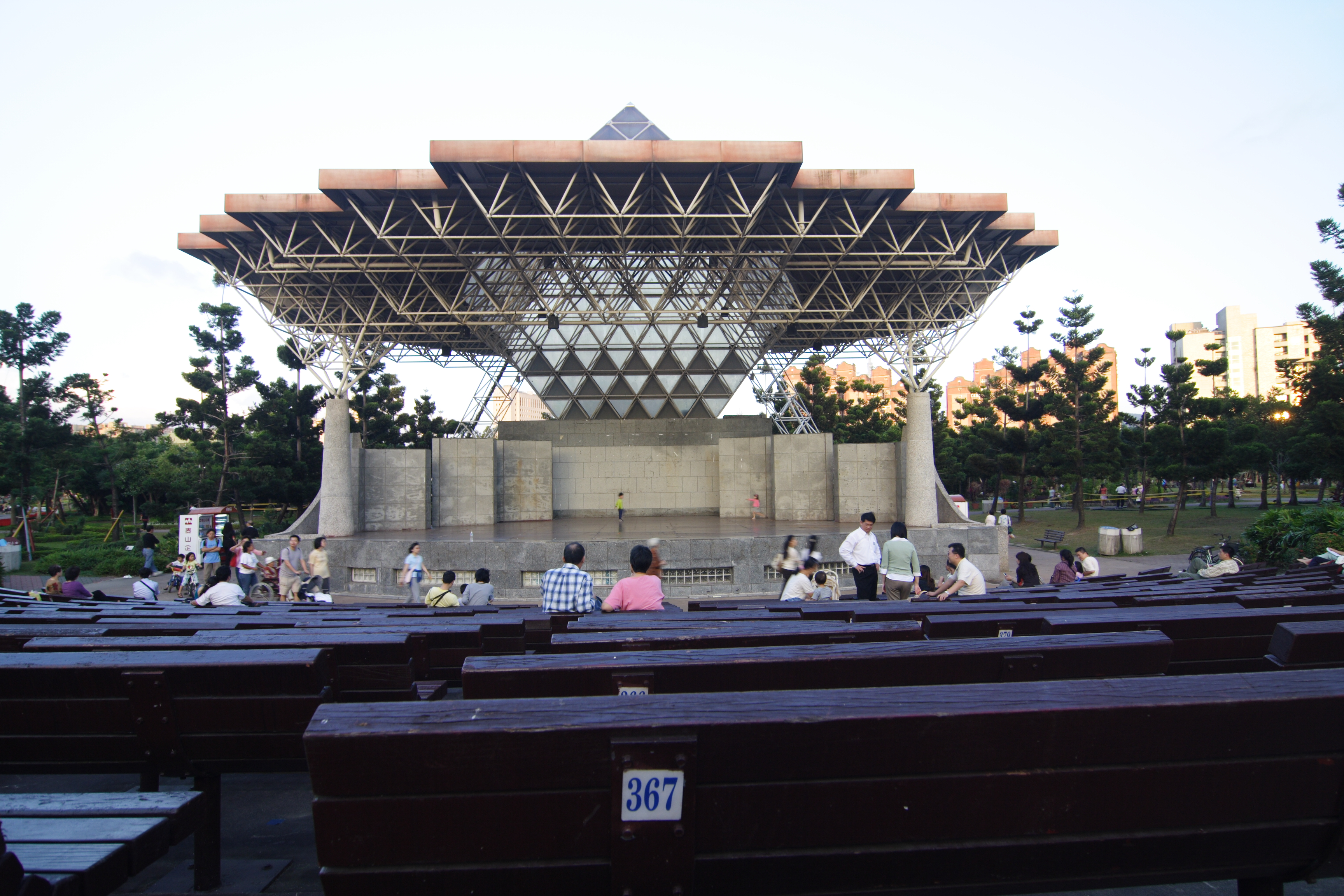 大安森林公園露天音樂台。